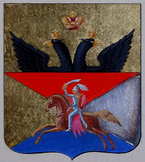 Беларуская (тарашкевіца): Сураж (Suraž). Герб места з «Пагоняй» («Pahonia»)